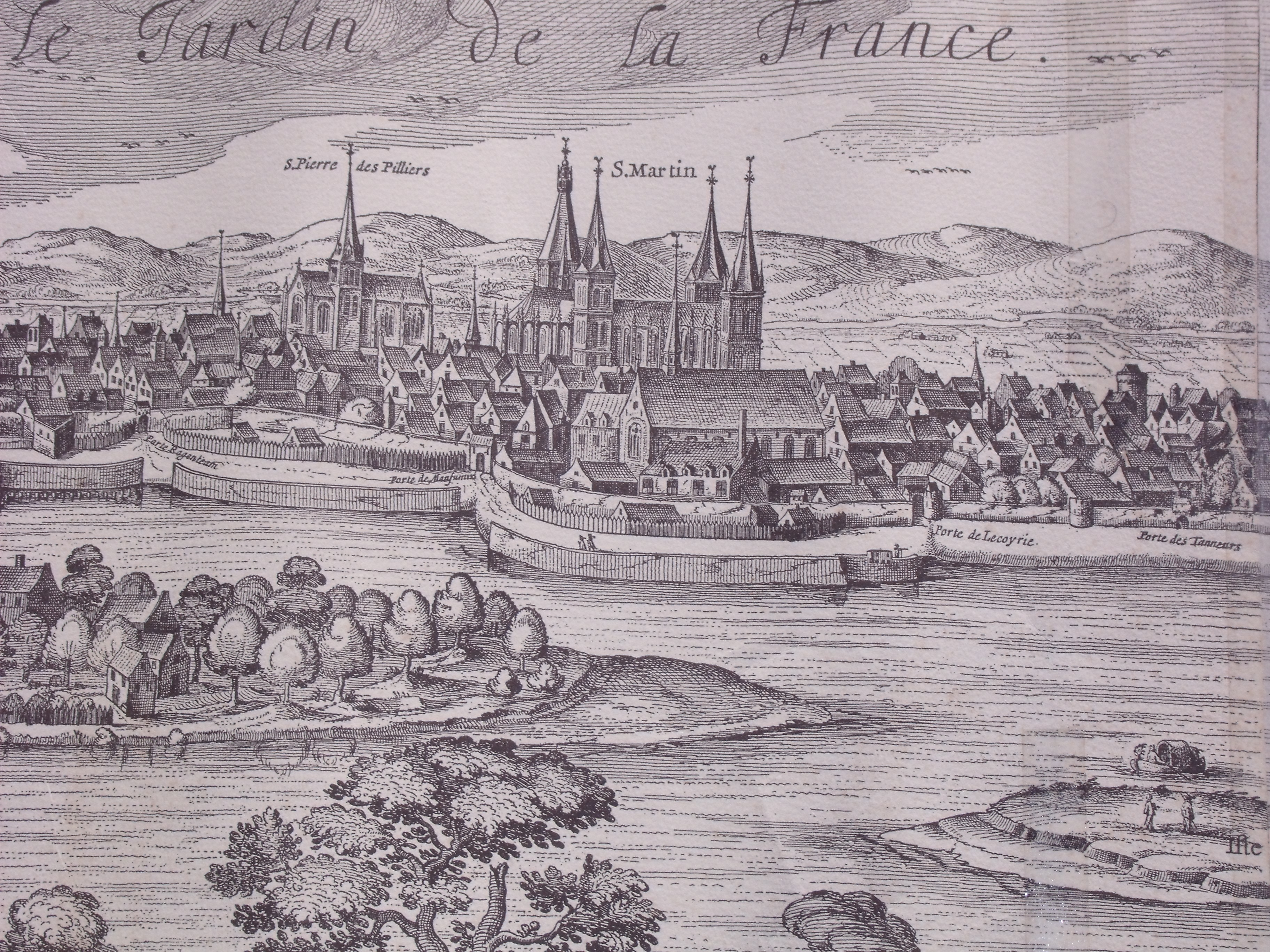 Quartier saint martin,extrait de l'estampe gravé par monsieur Claes Jansz Visscher en 1625 tiré d'un original sur vélin de 2.35 m sur 41 cm, propriété de desprez37